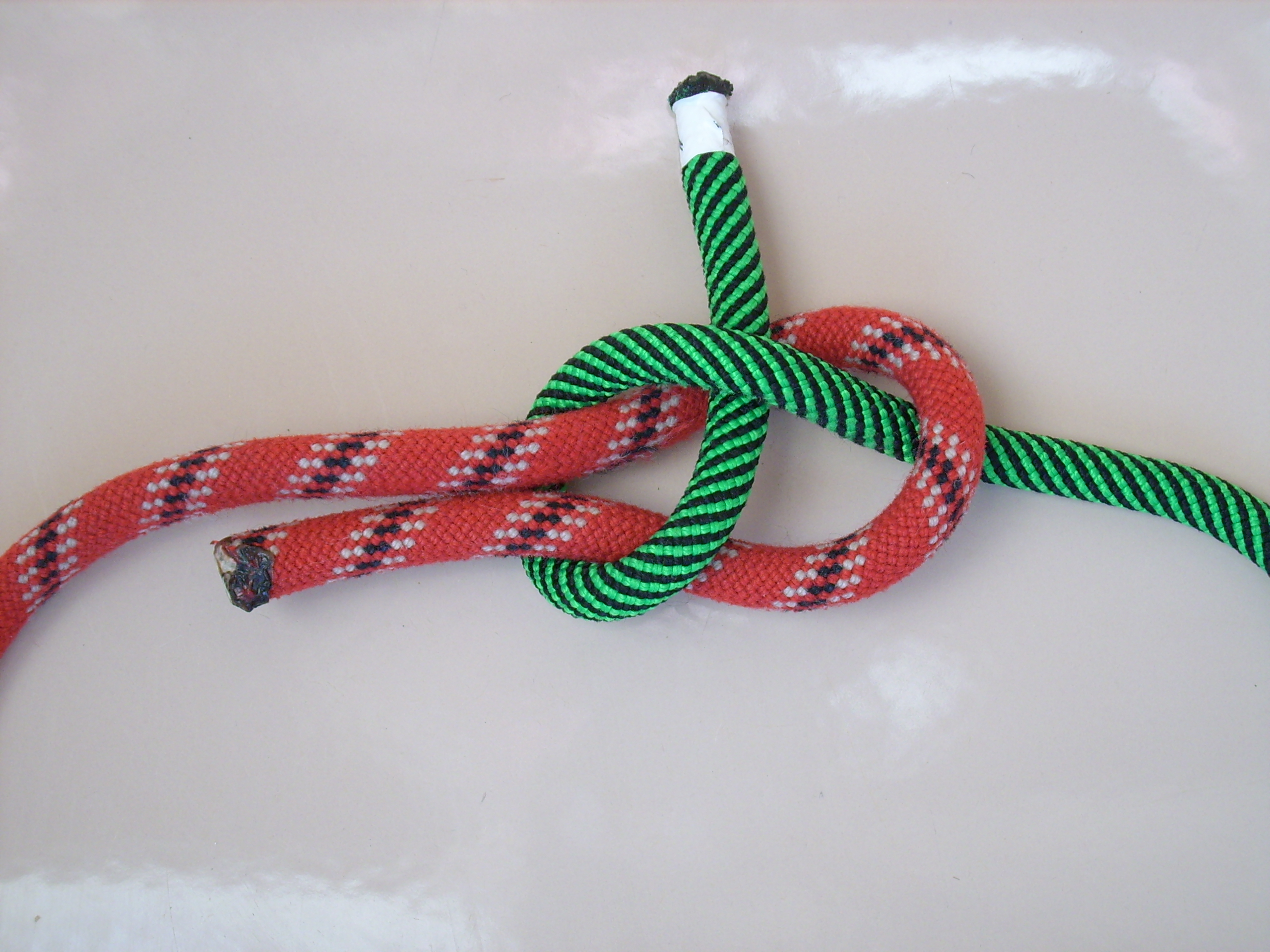 falscher (linker) Schotstek